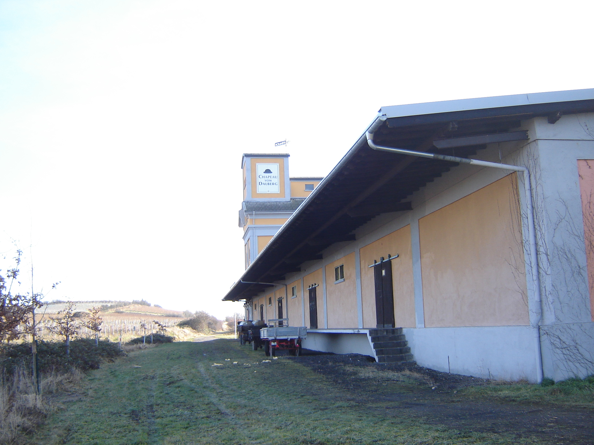 Die Verladestation der Lorchsmühle von Westhofen kommend. Die Rampe wurde über ein Ausweichgleis bedient.